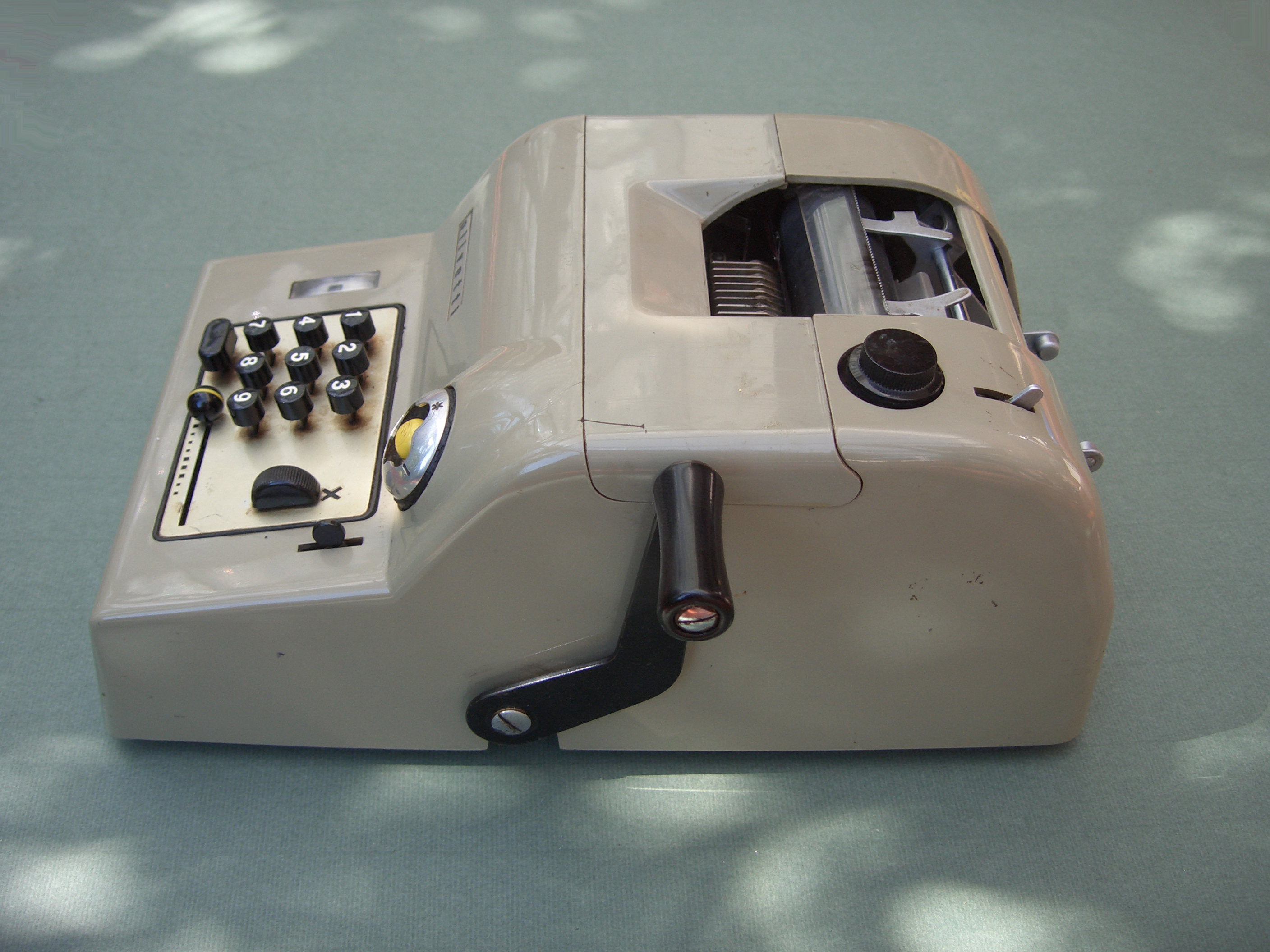 Olivetti Summa-15. Manual adding machine projected by Natale Capellaro and designed by Marcello Nizzoli in 1949 Photo: Christos Vittoratos